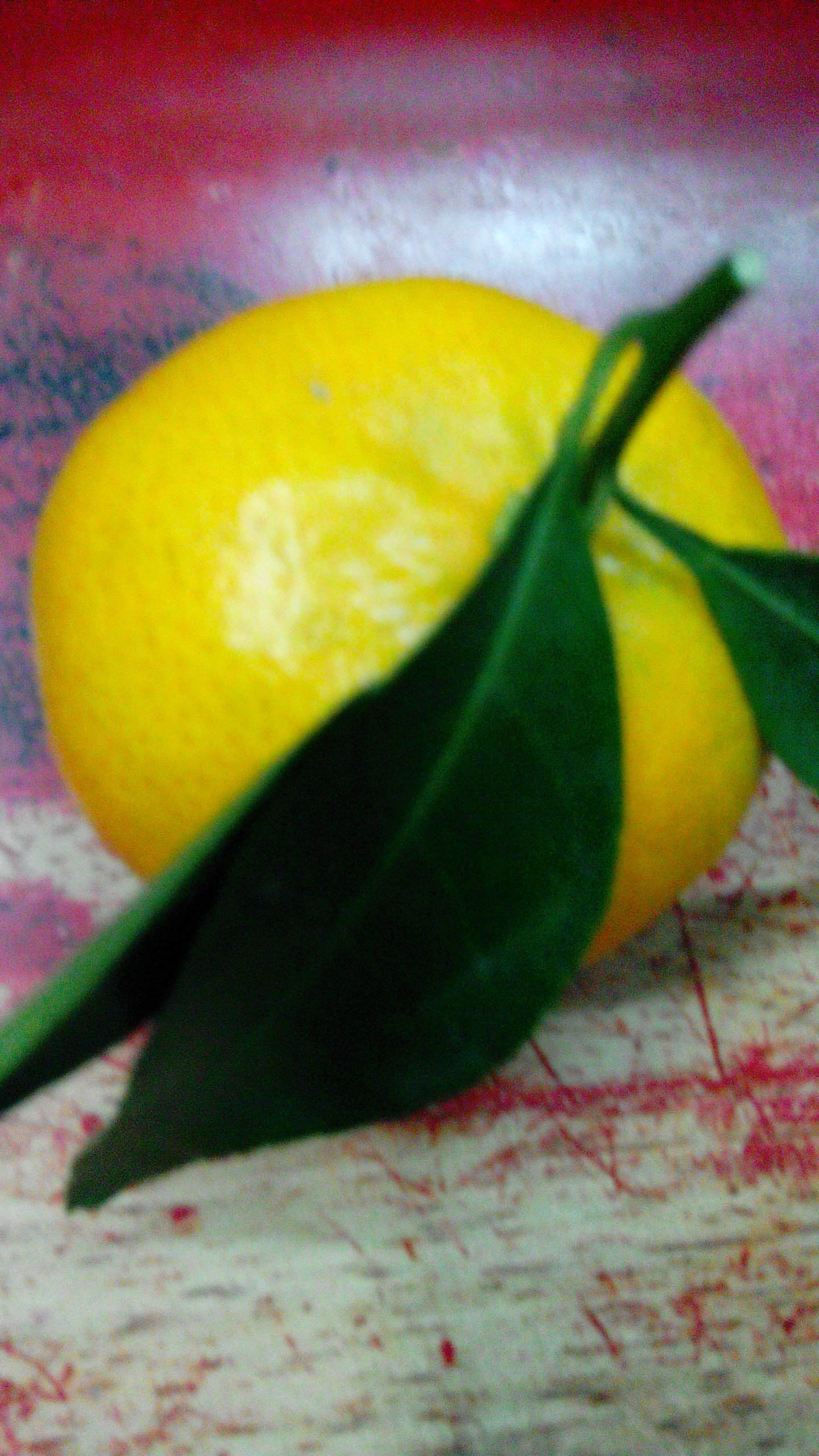 Một quả quýt